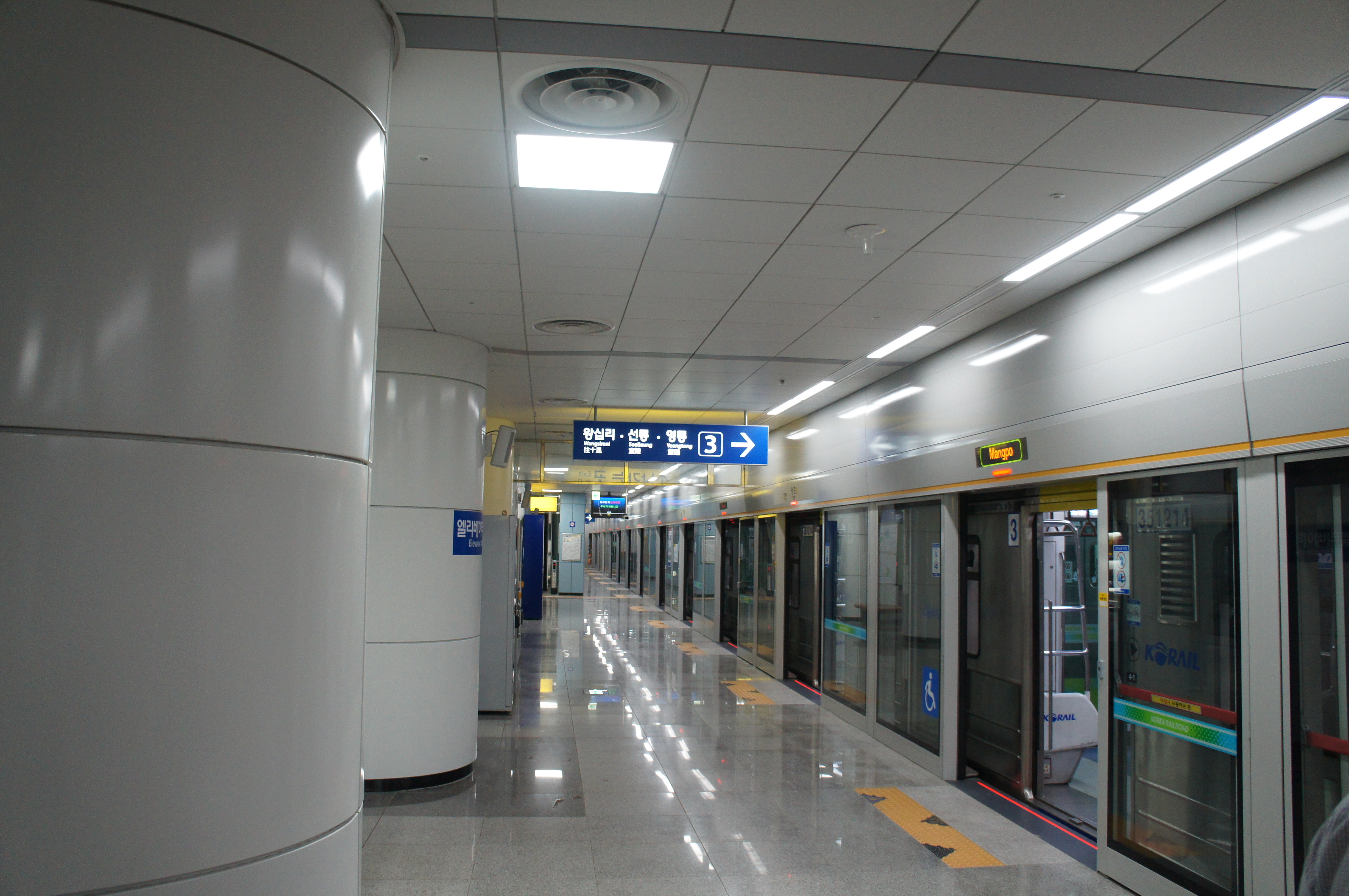 망포역 승강장